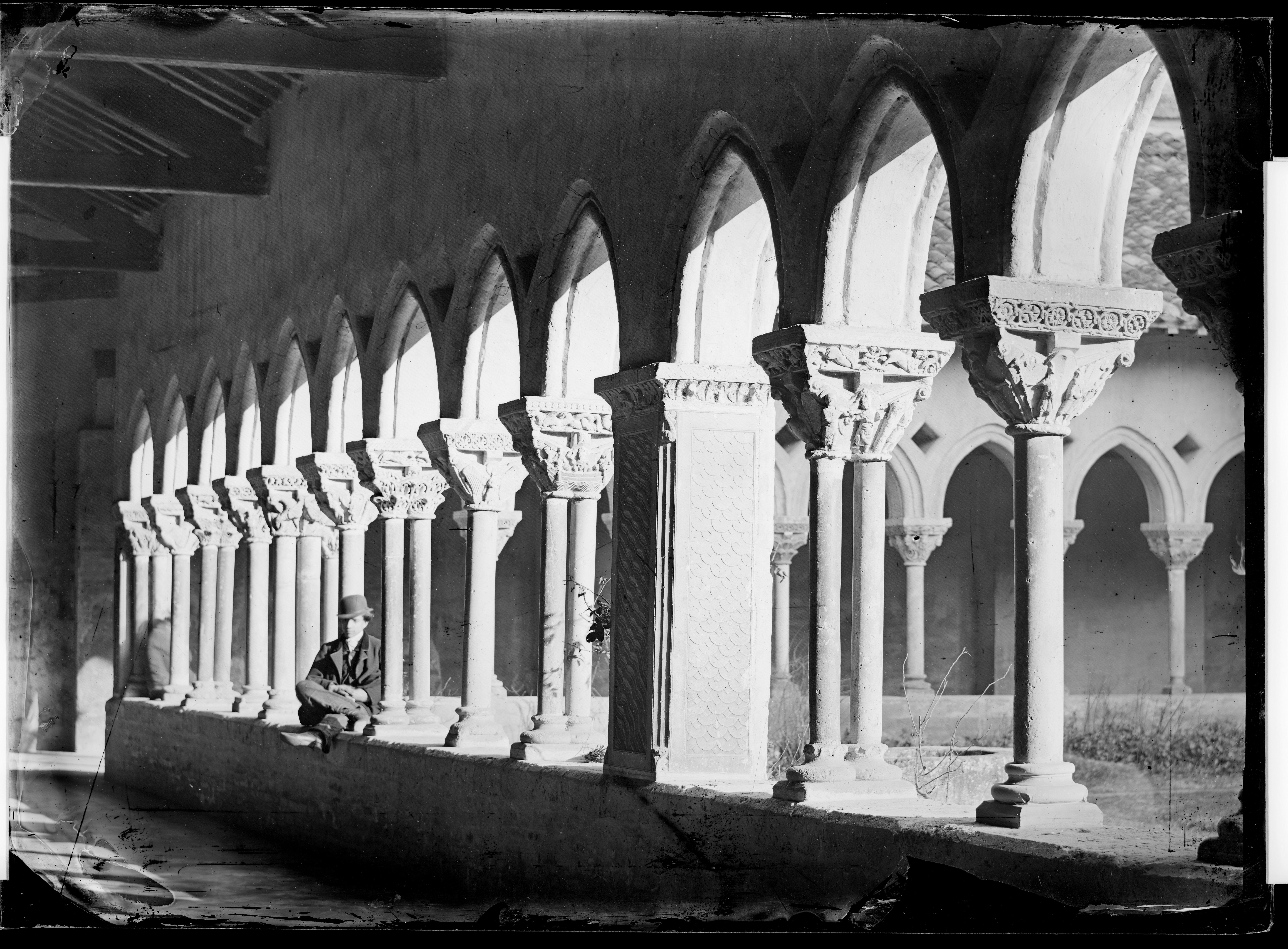 plaque négative au collodion format 13x18 cm inscription manuscrite par Eugène Trutat sur enveloppe : "Moissac - cloître A. Faure décembre coll. humide "